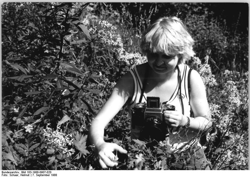 Biosphärenreservat Vessertal, Botanikerin ADN-ZB Schaar 7.9.1988 Bez. Suhl: Biosphärenreservat Vessertal- Diplombiologin Andrea Geithner vom Naturkundemuseum Gera, die verschiedene Pflanzenarten einer Untersuchungsfläche fotografiert, arbeitet an botanischen und zoologischen Komplexforschungen mit, die in Zusammenarbeit mit Wissenschaftlern der Universität Halle geleistet werden. siehe auch 1988-0907-19 und 21 N sowie ADN-Meldung vom 7.9.88.